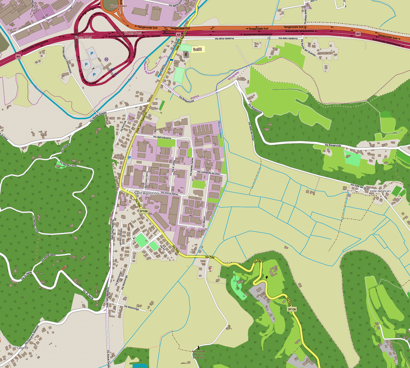 Mappa di Sant'Agostino